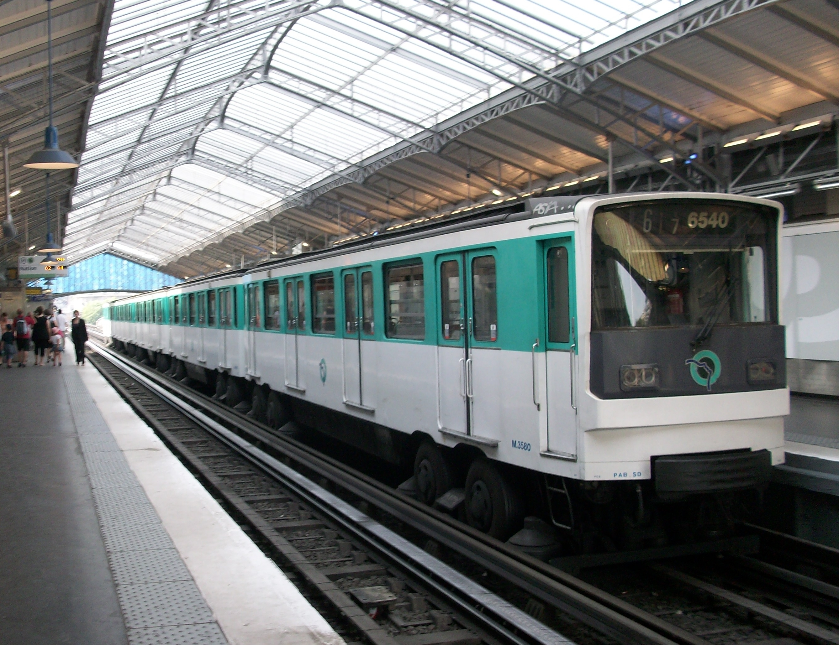 Une rame RATP MP 73